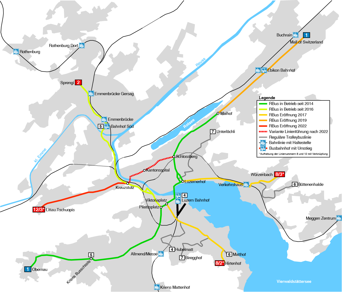 Geografisch korrekte Karte des geplanten RBus-Netz bis 2022. Zur besseren Orientierung wurden Siedlungsflächen und Gewässer hinterlegt. PNG-Upload um SVG-Darstellungsfehler zu vermeiden.